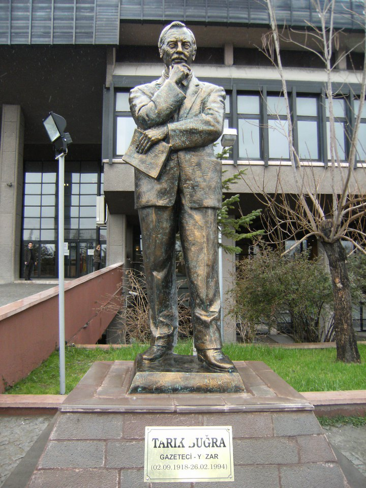 Milli kütüphane önündeki Tağrık Buğra heykeli Tankut Öktem tarafından yapılmıştır